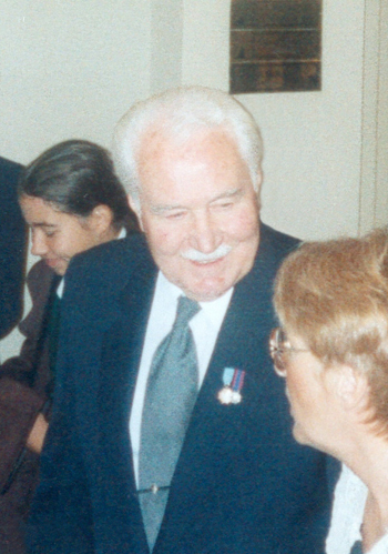 Ryszard Kaczorowski - the last president of Republic of Poland in Exile Ryszard Kaczorowski - ostatni prezydent RP na Uchodźstwie.